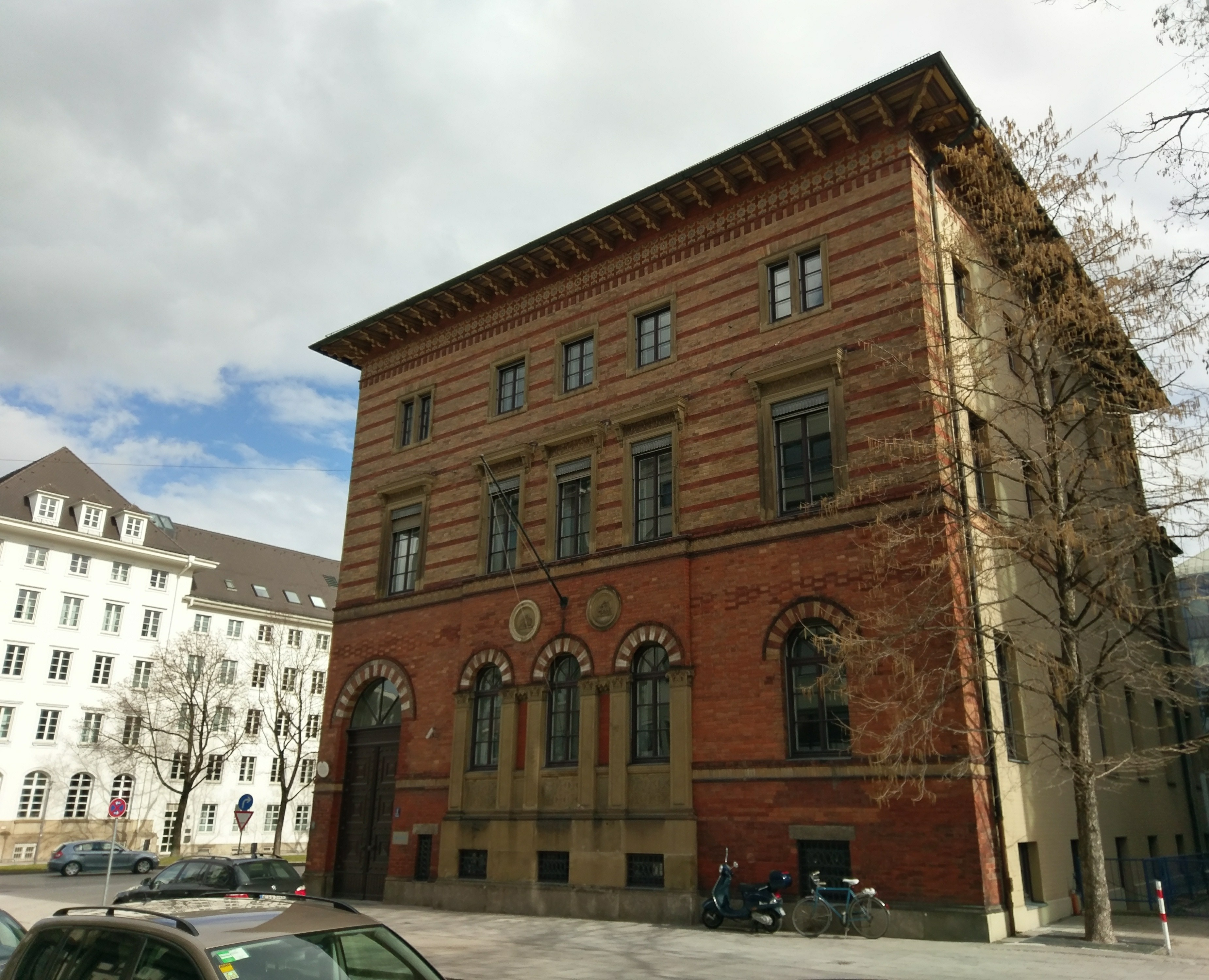 Gebäude der ehemaligen preußischen Gesandtschaft in München